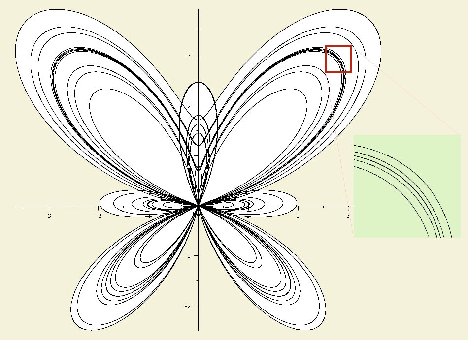 De transcendente vlindercurve.